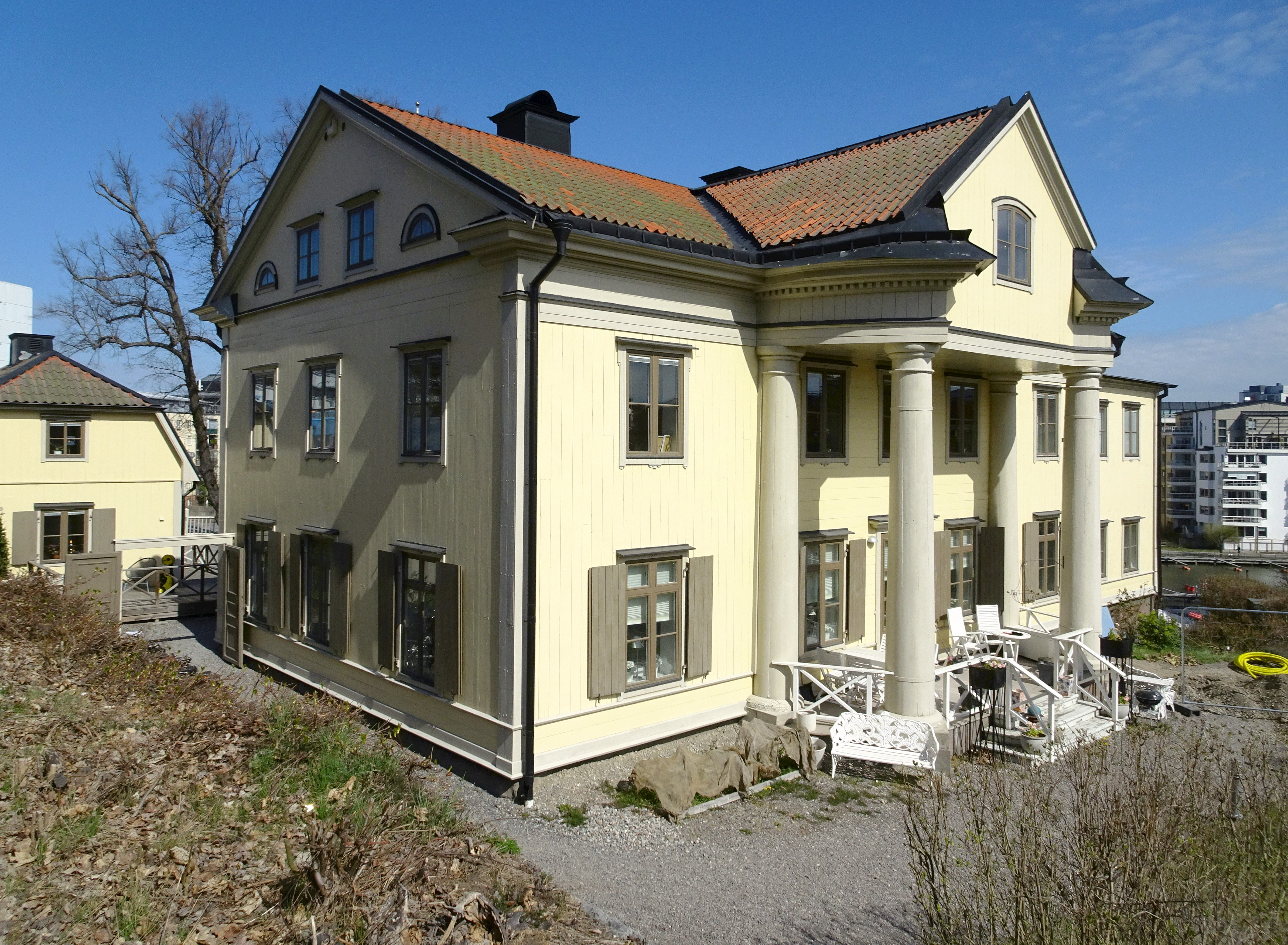 Mariehälls gård huvudbyggnad